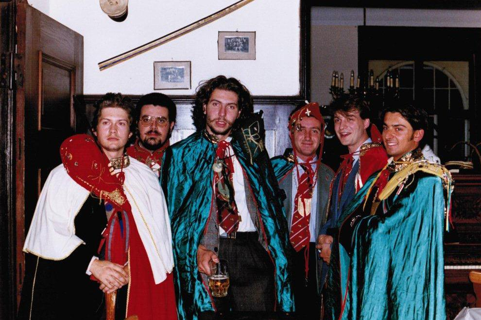 Studentenvereinigung Supremu_Ordo_Estensii_Bareii1 aus Varese zu Besuch beim Freiburger Wingolf